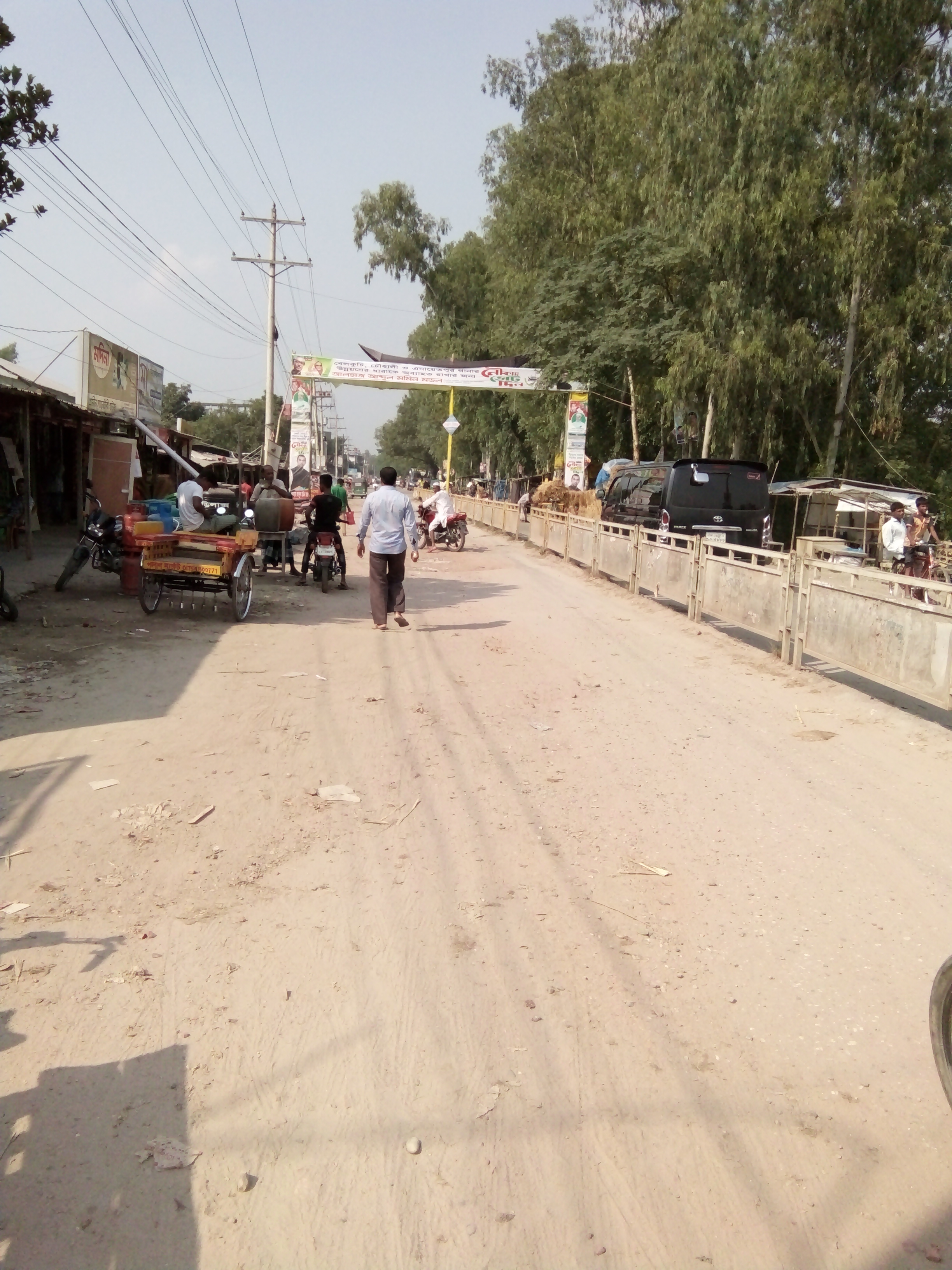 সিরাজগঞ্জ-এনায়েতপুর সড়ক মুকুন্দগাতি বাস টপেজ